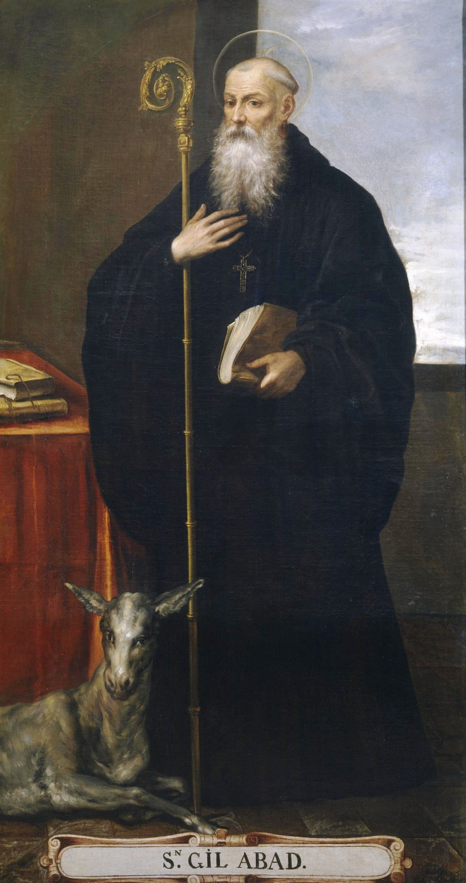 La obra representa a San Gil Abad, y a sus pies aparece representada una cierva, que es uno de los atributos que frecuentemente le acompañan.